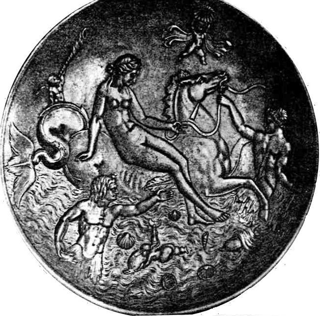 Silver plate founded in Yenikend village (Qabala, Azerbaijan)